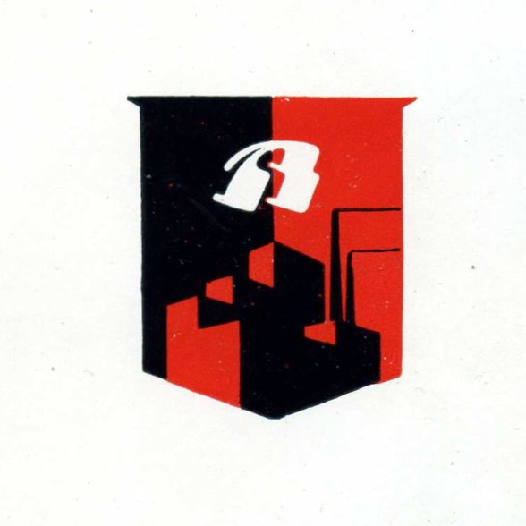 Bata Logo 1935